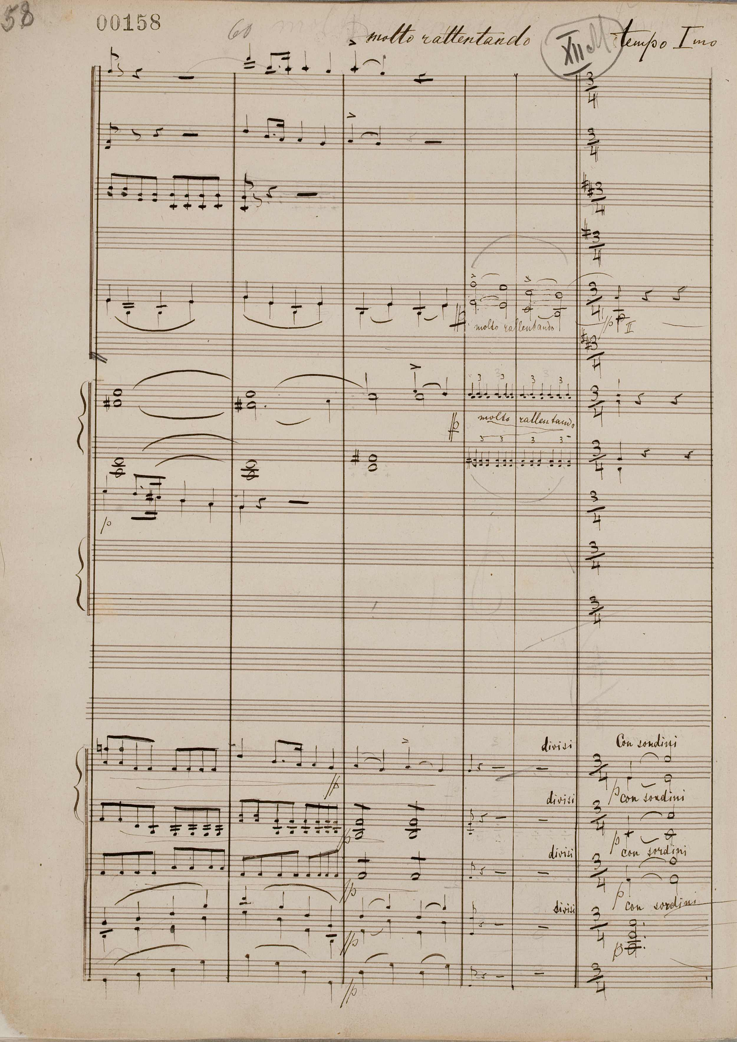 Dies ist eine Seite aus dem Originalmanuskript des sinfonischen Gedichts "Miške" von MK Čiurlionis.